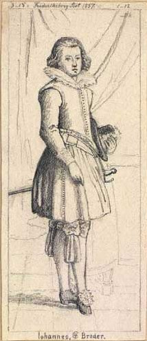 Tegning fra Den Store Danske, opprinnelig fra Det Kongelige Bibliotek. Tegningen viser Hans (1583-1602), sønn av Frederik II og Sophie av Mecklenburg, bror av Christian IV. Tegning fra 1857 av ukjent kunstner. Øverst står det Frederiksborg Slot 1857, nederst Iohannes C4 Broder